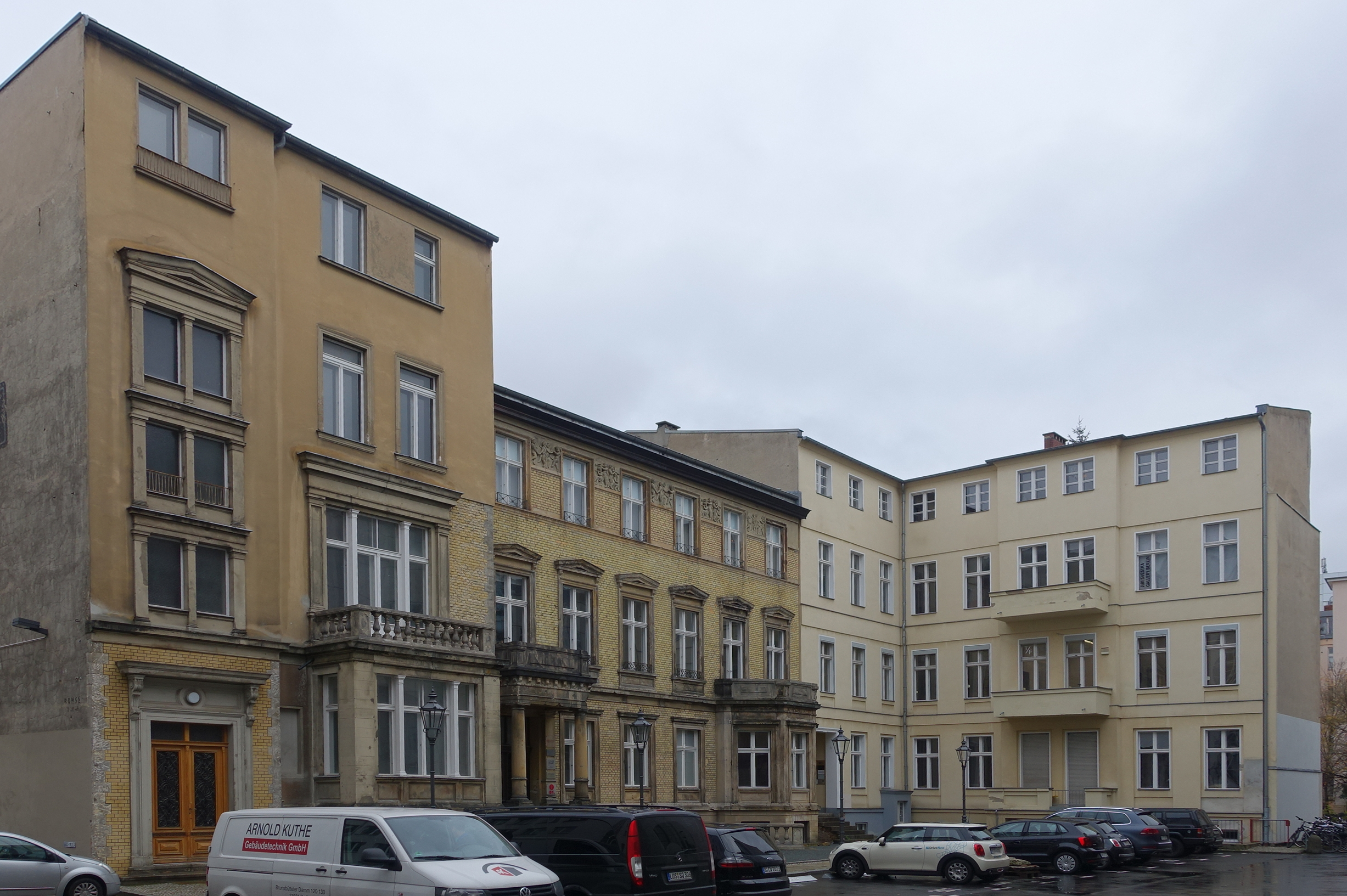 Wohnhaus